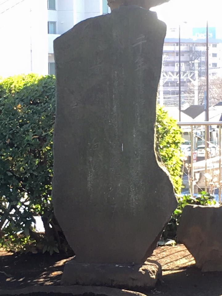 蓮法寺(横浜市)にある浦島太郎の顕彰歌碑